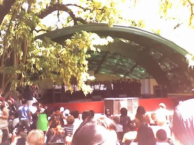 Auditorio, Merlo.